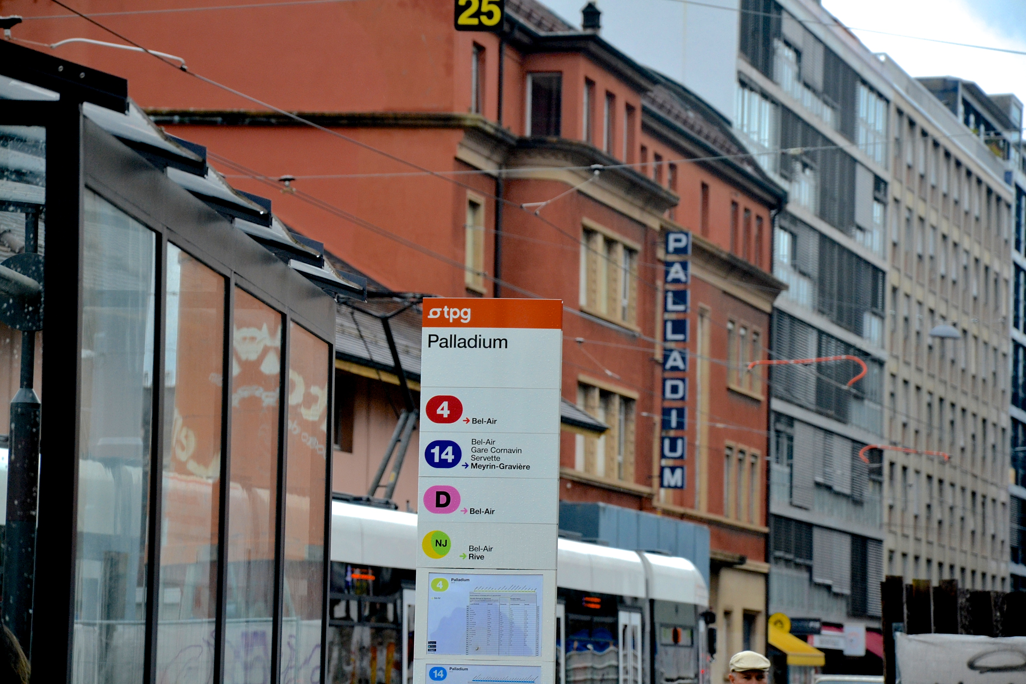 Arrêt Palladium, ligne 14 du tram de Genève.